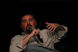 Jonathan Hickman le 29 septembre 2012